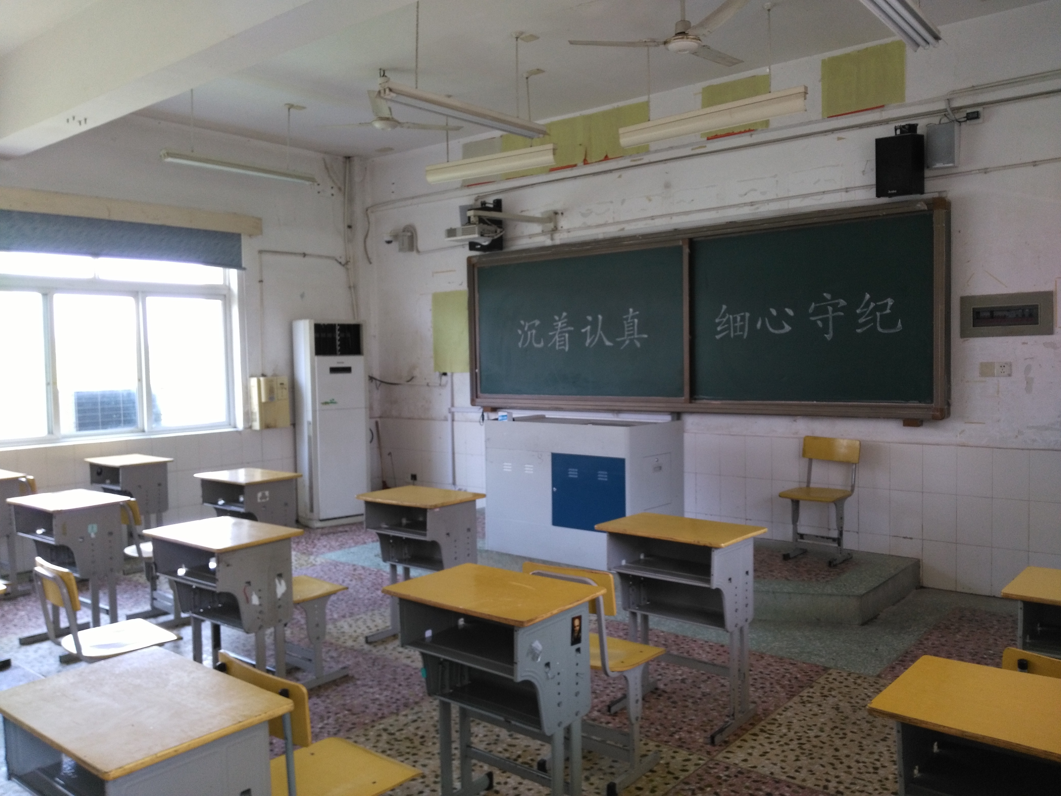 依照考点要求，布置完毕的高考考室。考室对于座位数、座位间距等均有要求，同时要求被选为考点的学校事先检查监控、广播等设备是否正常。